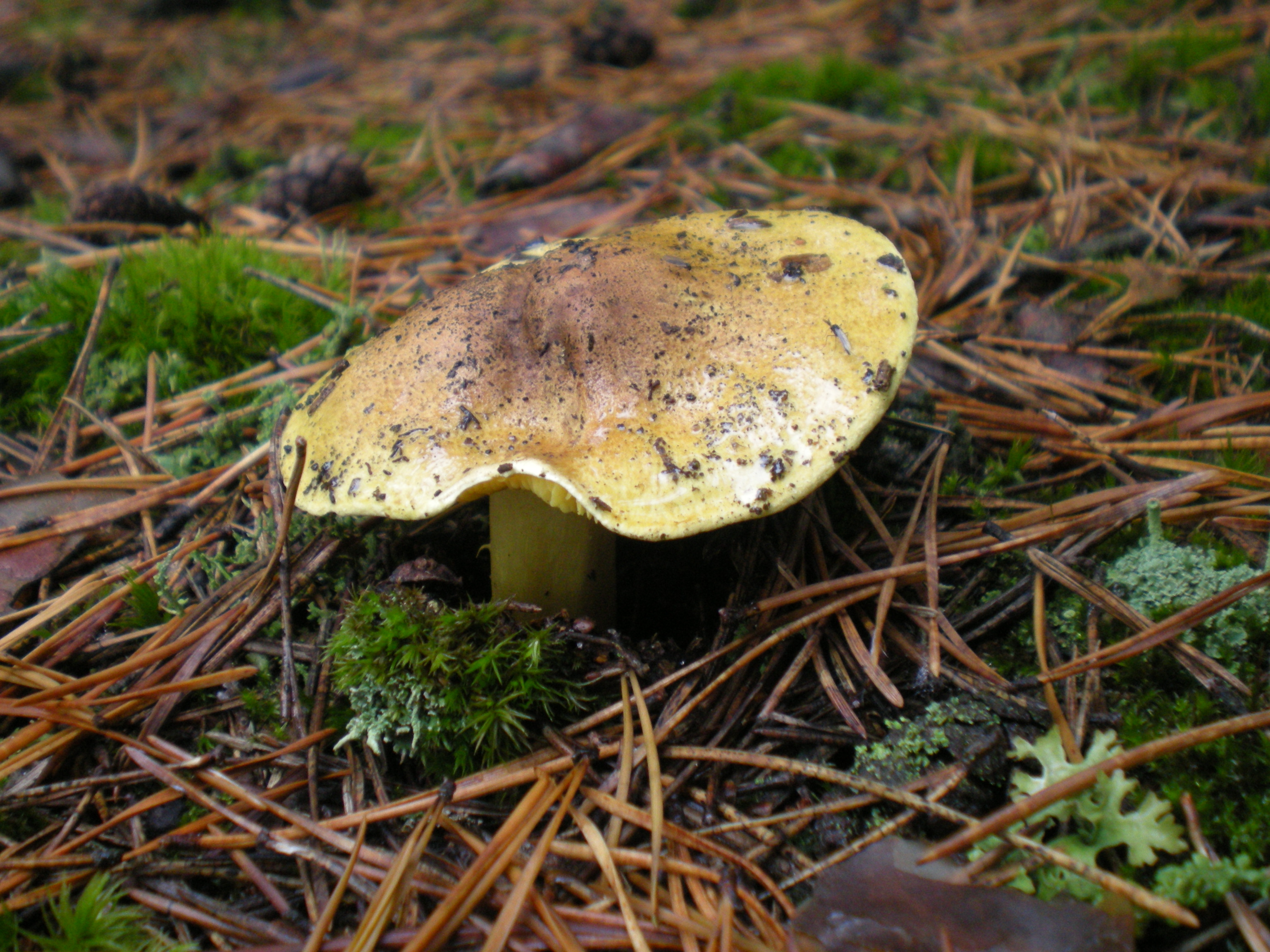 Gąska zielonka